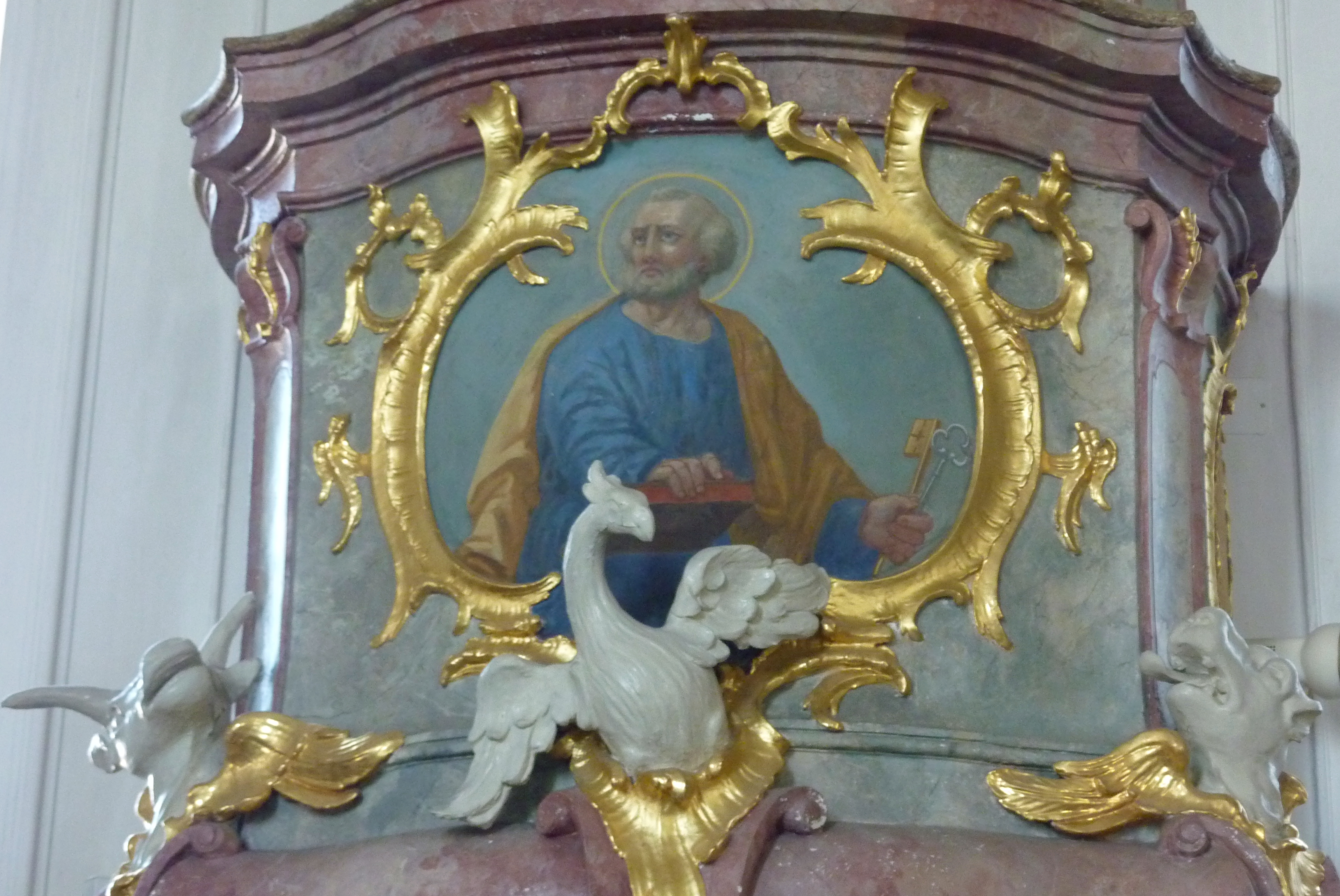 Katholische Pfarrkirche St. Nikolaus in Deisenhofen, einem Stadtteil von Höchstädt an der Donau im Landkreis Dillingen an der Donau (Bayern), Kanzel um 1760, mit Bild des hl. Petrus wohl von Johann Anwander und Symbolen der Evangelisten